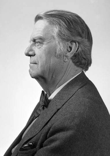 portrett, mann, religionshistoriker, professor, brystbilde, profil.